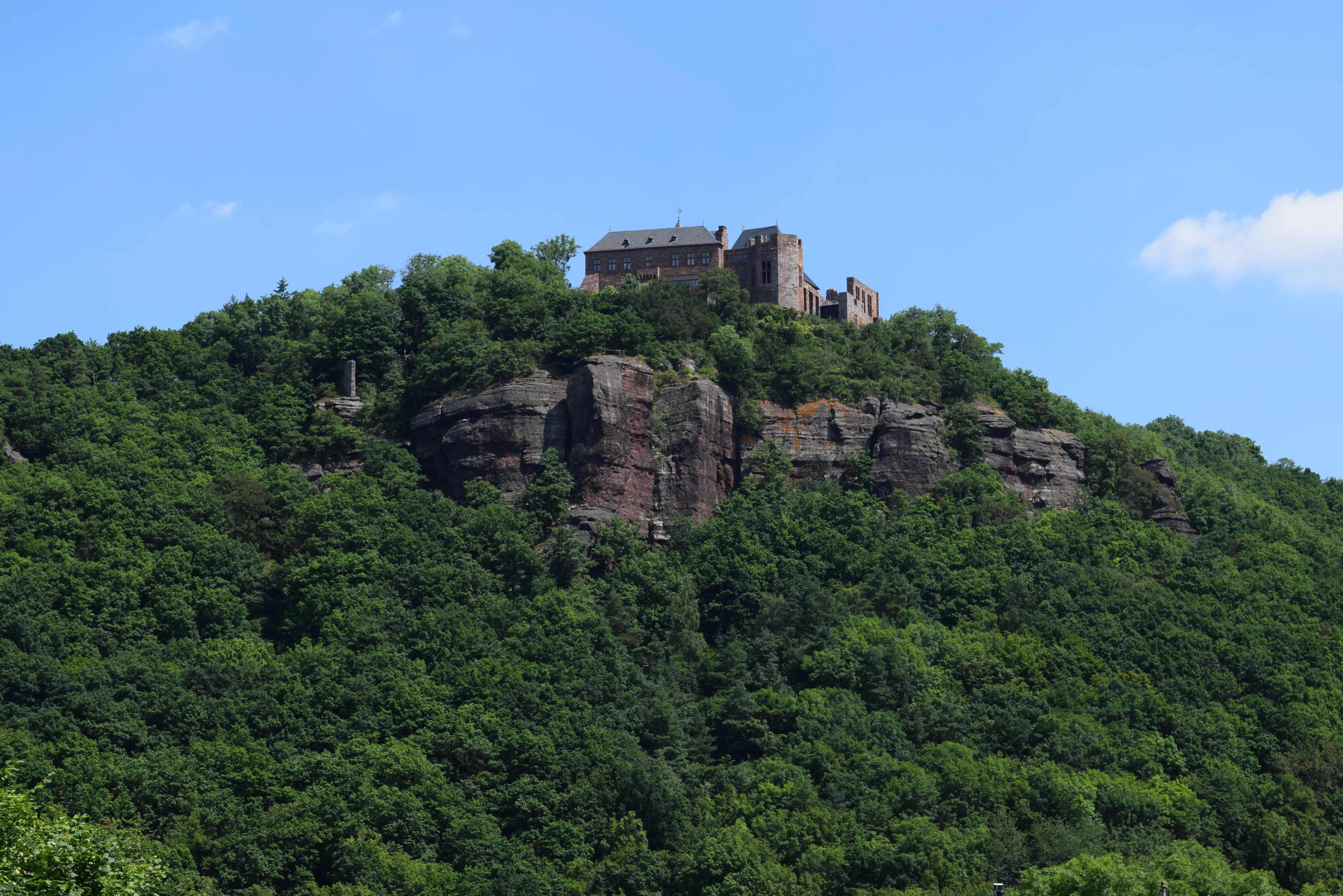 Burg Nideggen aus Südwesten von der L 246 (2016)